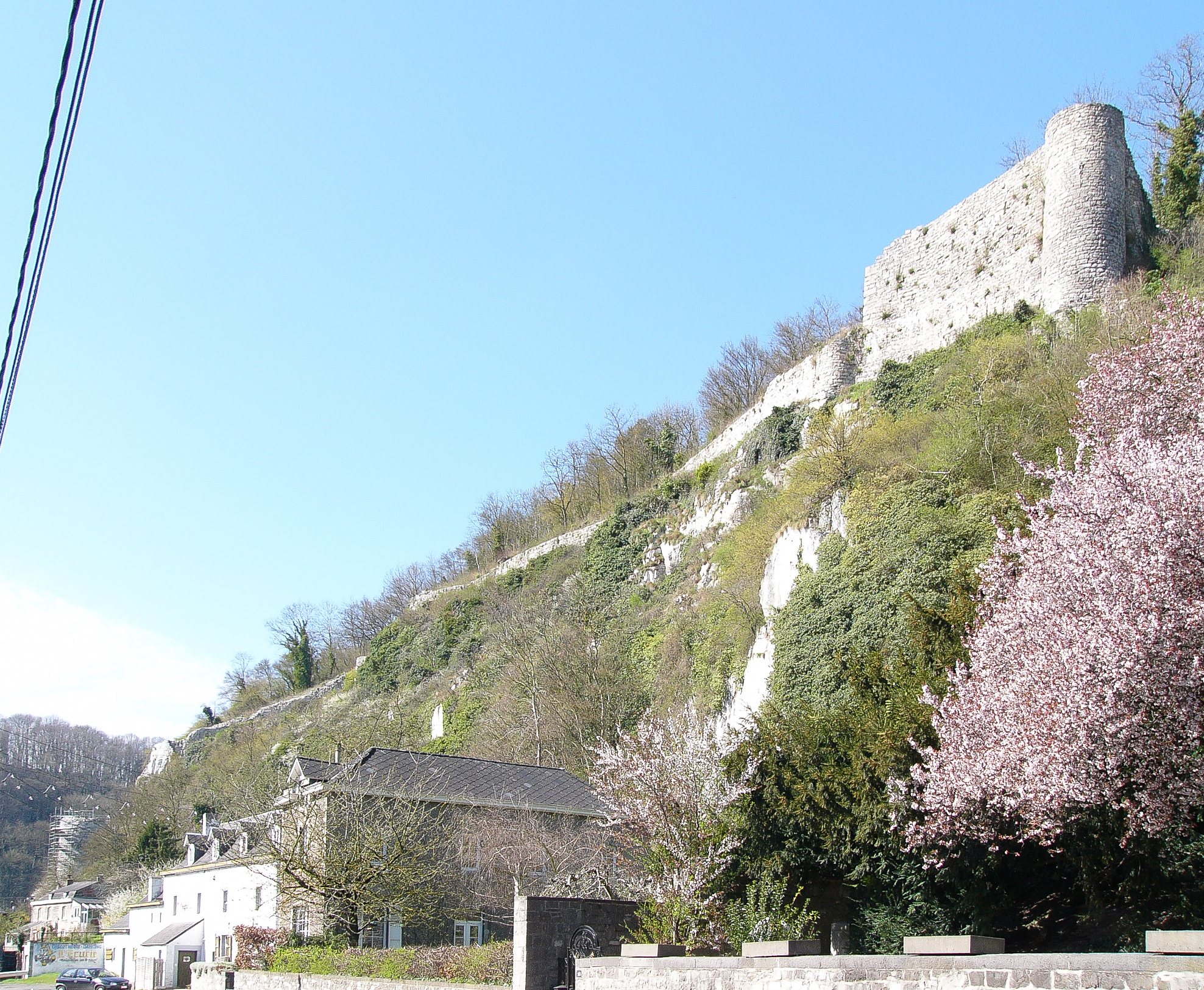 Römerzeitliche Festung im wallonischen Dorf Samson